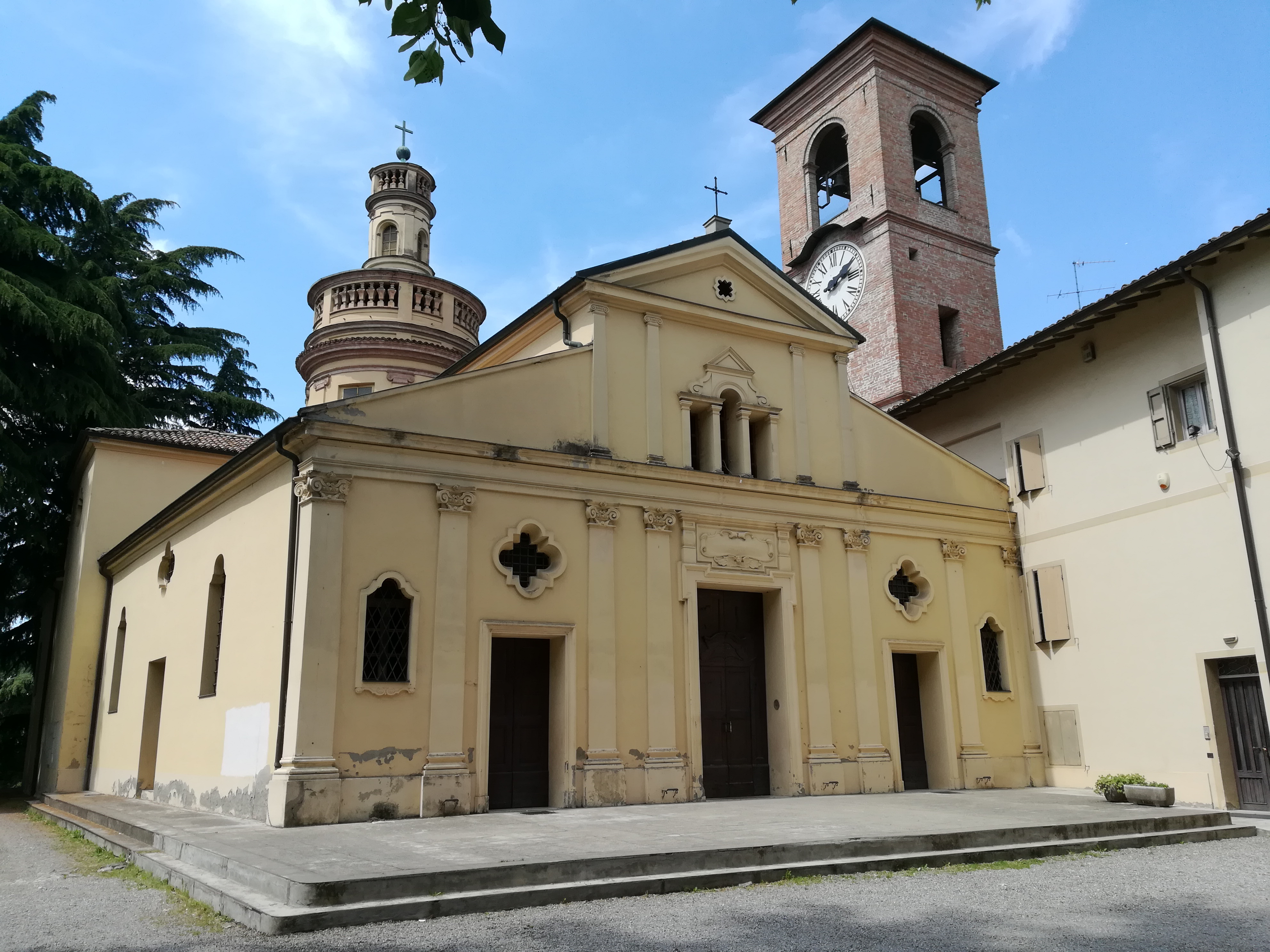 Cavriago (Province of Reggio Emilia)